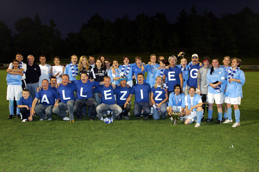 D'Entente IZEG/RFCUL zesumme mat hire Supporter no der Coupe-Finale 2008 um Escher Galgebierg.